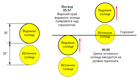 Восход солнца во время равноденствия. Истинный восход (когда центр истинного солнца находится на уровне горизонта) приходится на 6:00 астрономического времени. Видимый восход (когда верхний край видимого солнца появляется над горизонтом) наступает примерно в 5:57. 1 минуту разницы даёт прохождение через горизонт половины солнечного диска (15 угловых минут), ещё 2 минуты 20 сек — рефракция (35 угловых минут). Скорость движения солнца по небосводу — 360 градусов за 24 часа или 15 угловых минут в минуту